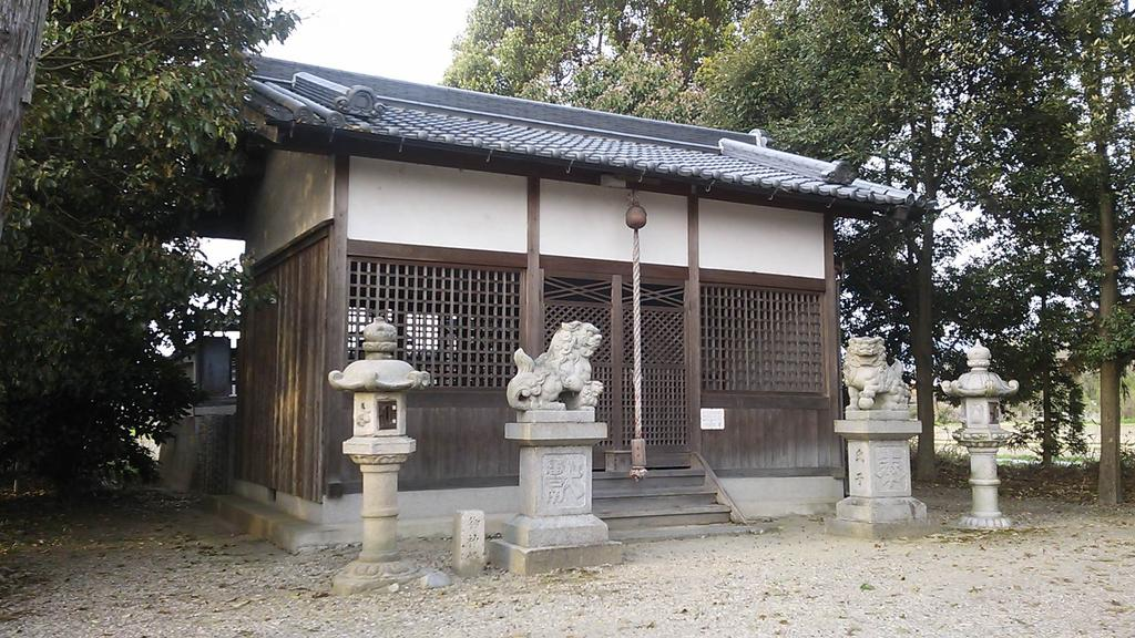 岐多志太神社拝殿